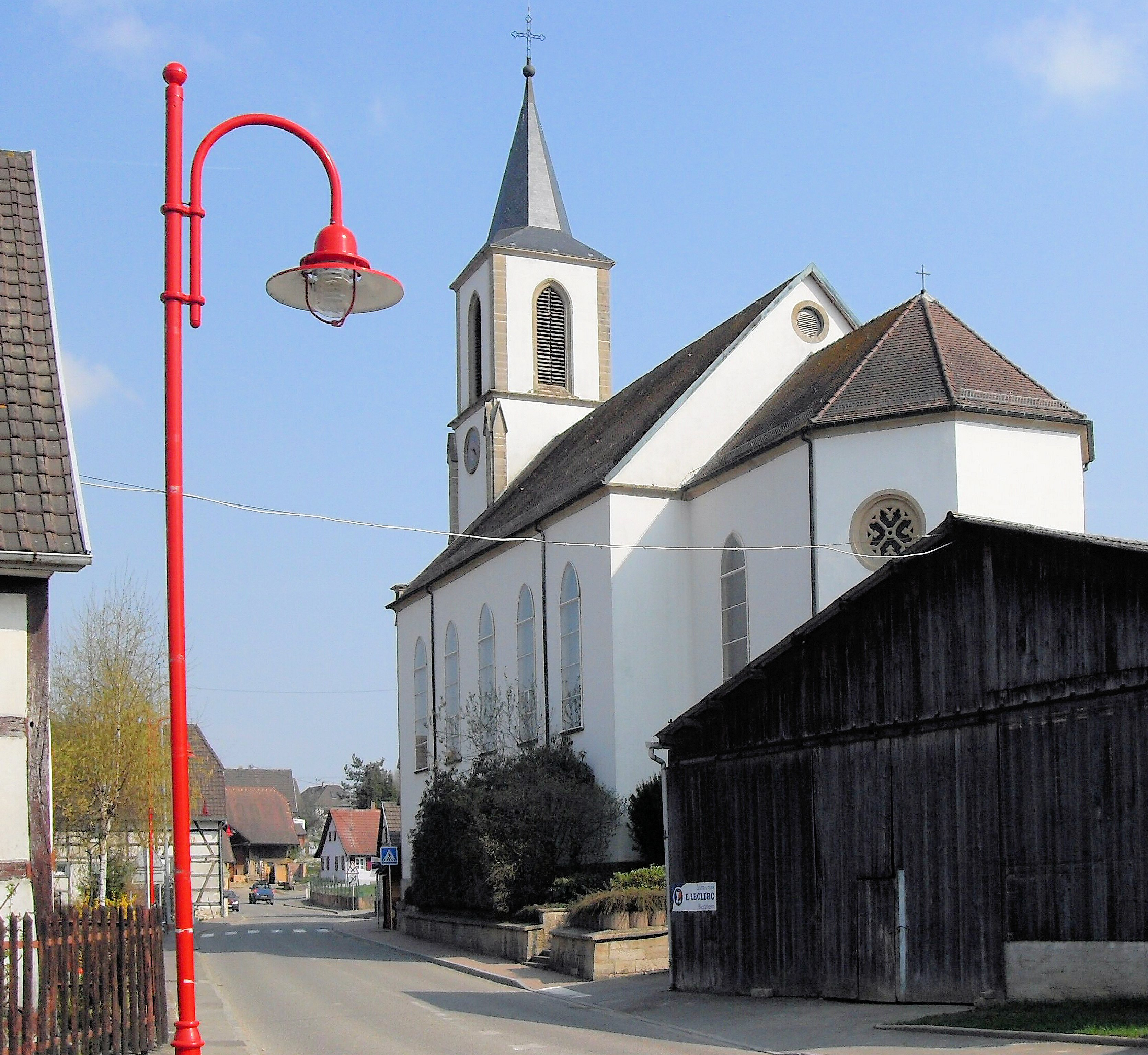 L'église Saint-Léger à Kœtzingue